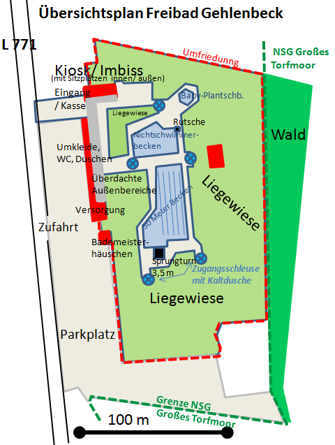 Plan des Freibades Gehlenbeck